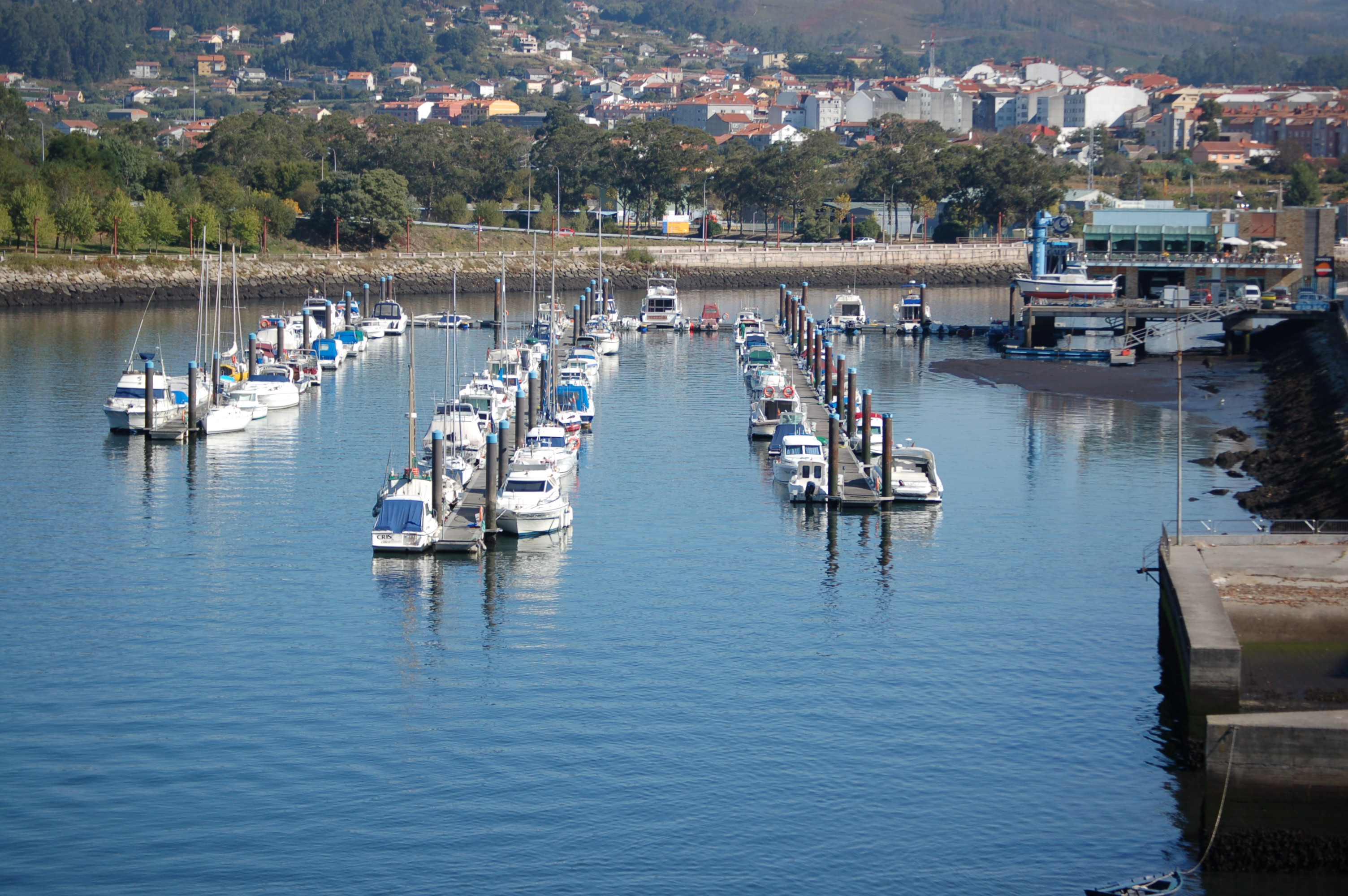 Porto deportivo de Pontevedra